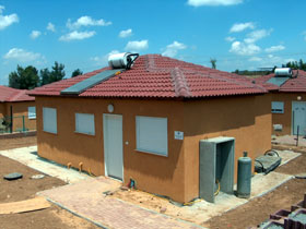 קראוילה בשכונת הקראוילות השוכנת בשולי he:אמציה (יישוב). במקום שוהים מפוני היישוב he:קטיף מhe:גוש קטיף. שכונת מבני הקבע תמוקם בסמוך ליישוב אמציה. 5/2006 צילום:מיכאלי 08:48, 4 מאי 2006 (IDT)